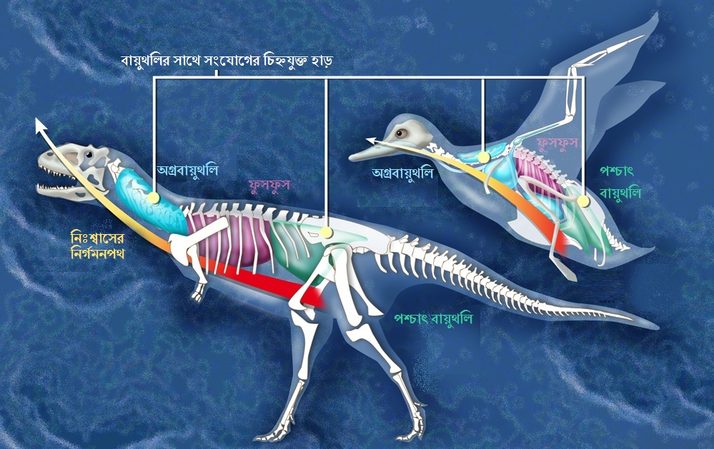 পাখি এবং মাজুঙ্গাসরাস ডাইনোসরের বায়ুথলির অবস্থানের তুলনামূলক চিত্র।